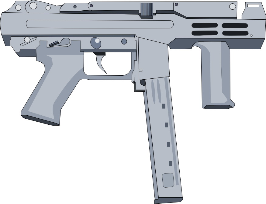 Spectre M4 submachinegun